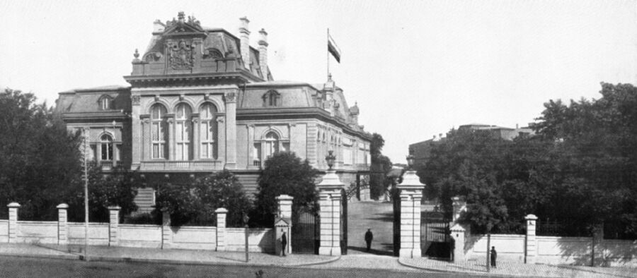 Royal Palace, Sofia, Bulgaria